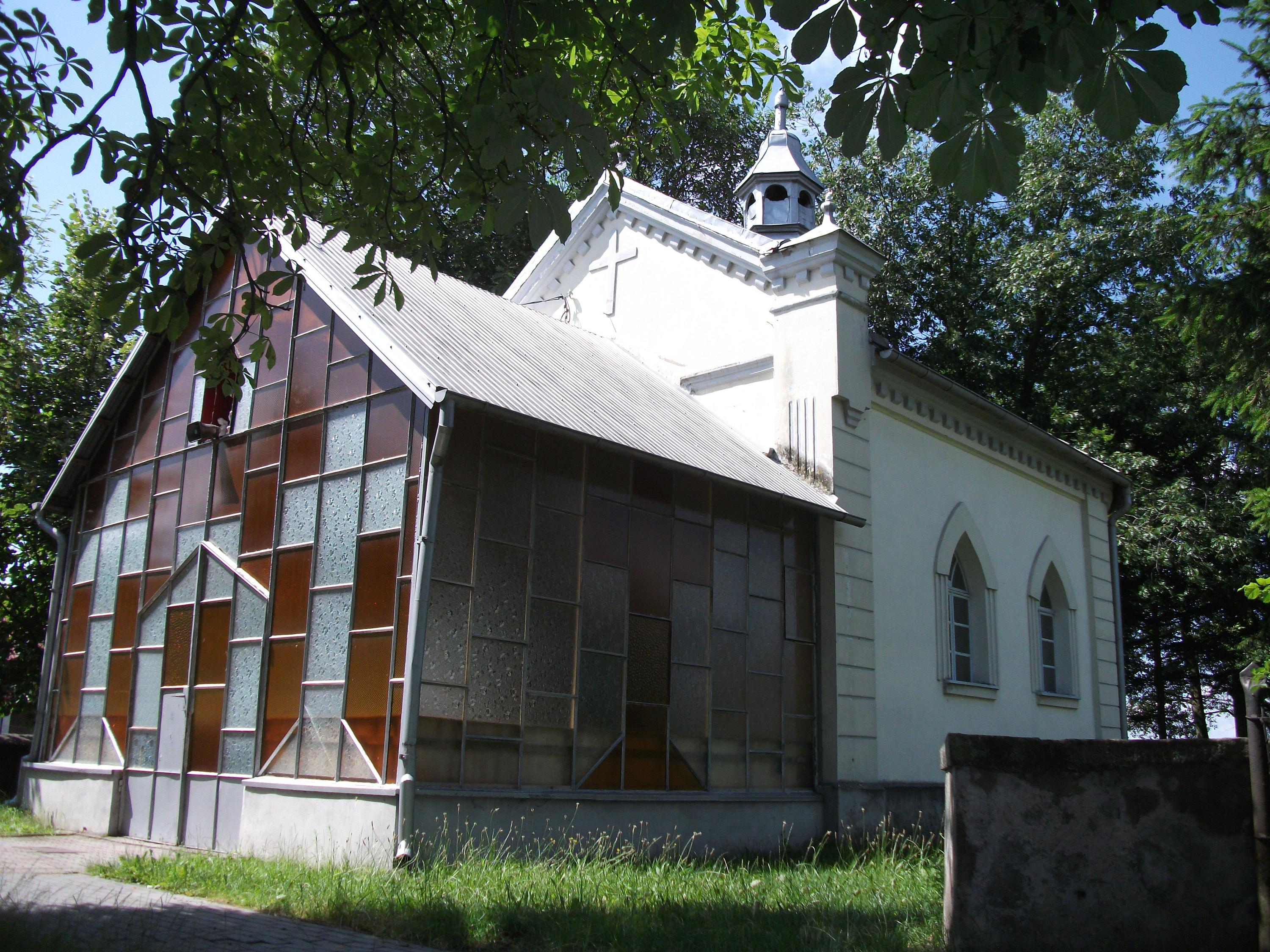 Kaplica w Turowie k/Wielunia